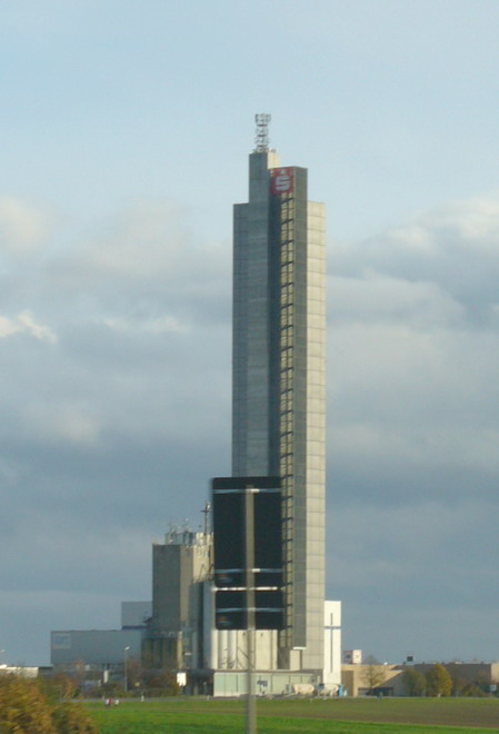 Schapfenmuehle in Ulm-Jungingen selbst fotografiert B10 - am 1.11.2005 von user:Enslin